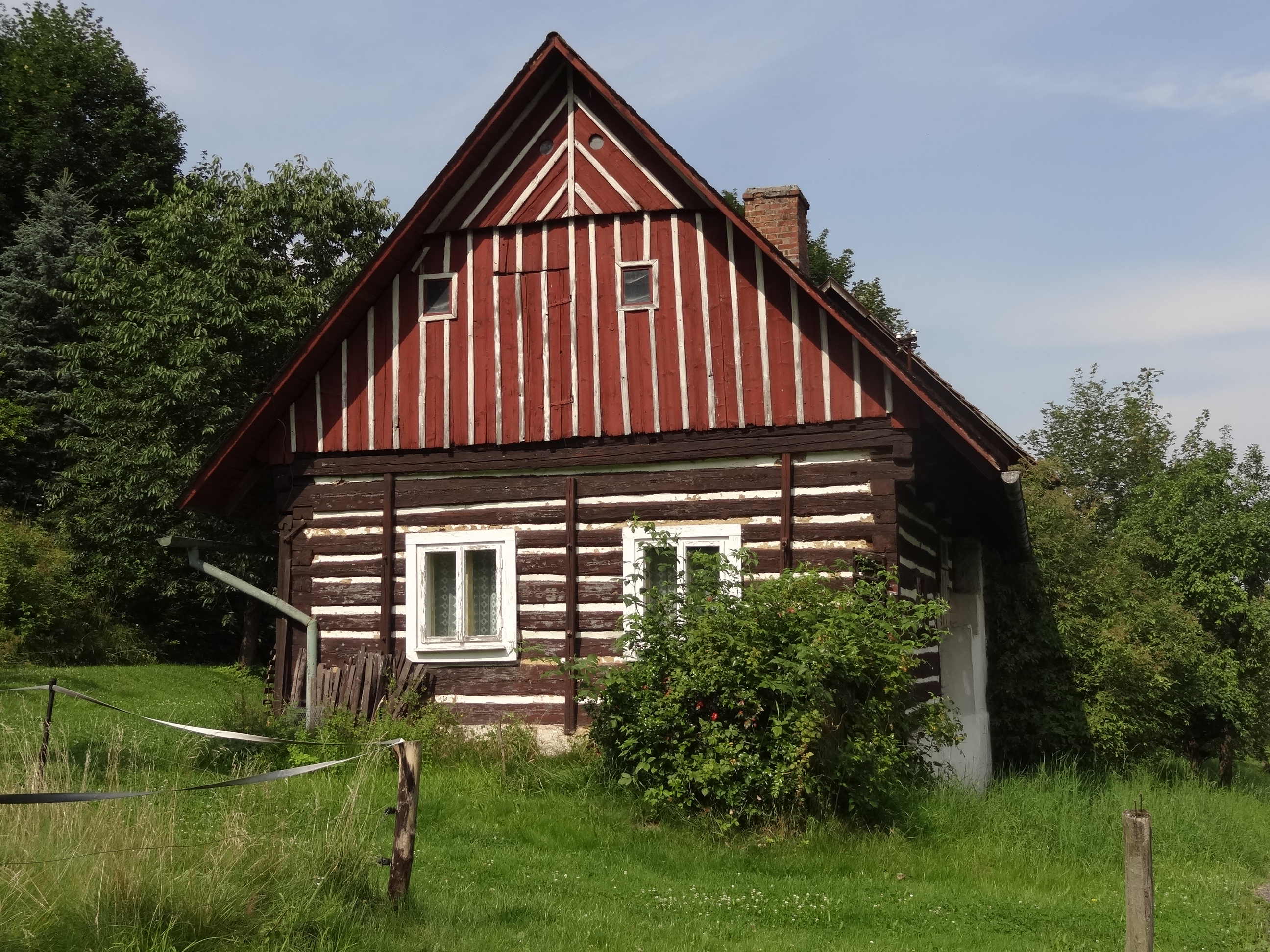 Kocourov (v Podještědí) - chalupa če. 3